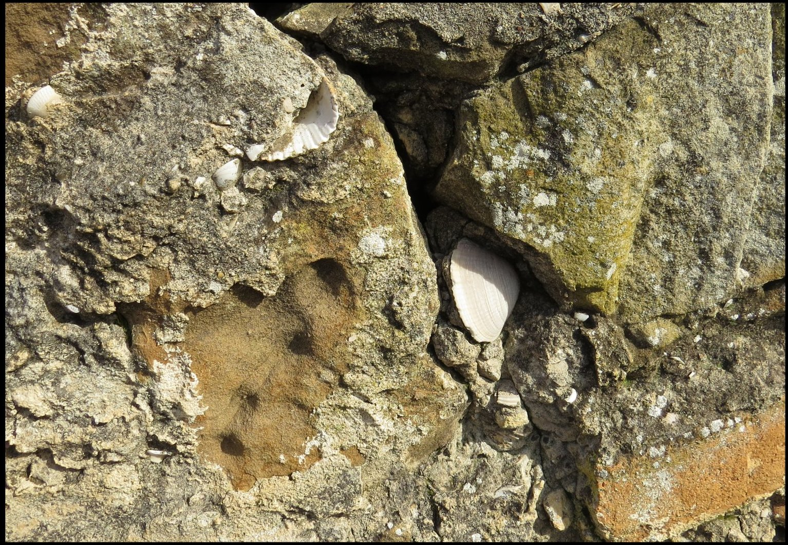 Valves de Lamellibranches (Cardium, Tapes) incluses en totalité dans le mortier d'un mur. Villa romaine de Fount de Rome, Fleury d' Aude, Occitanie